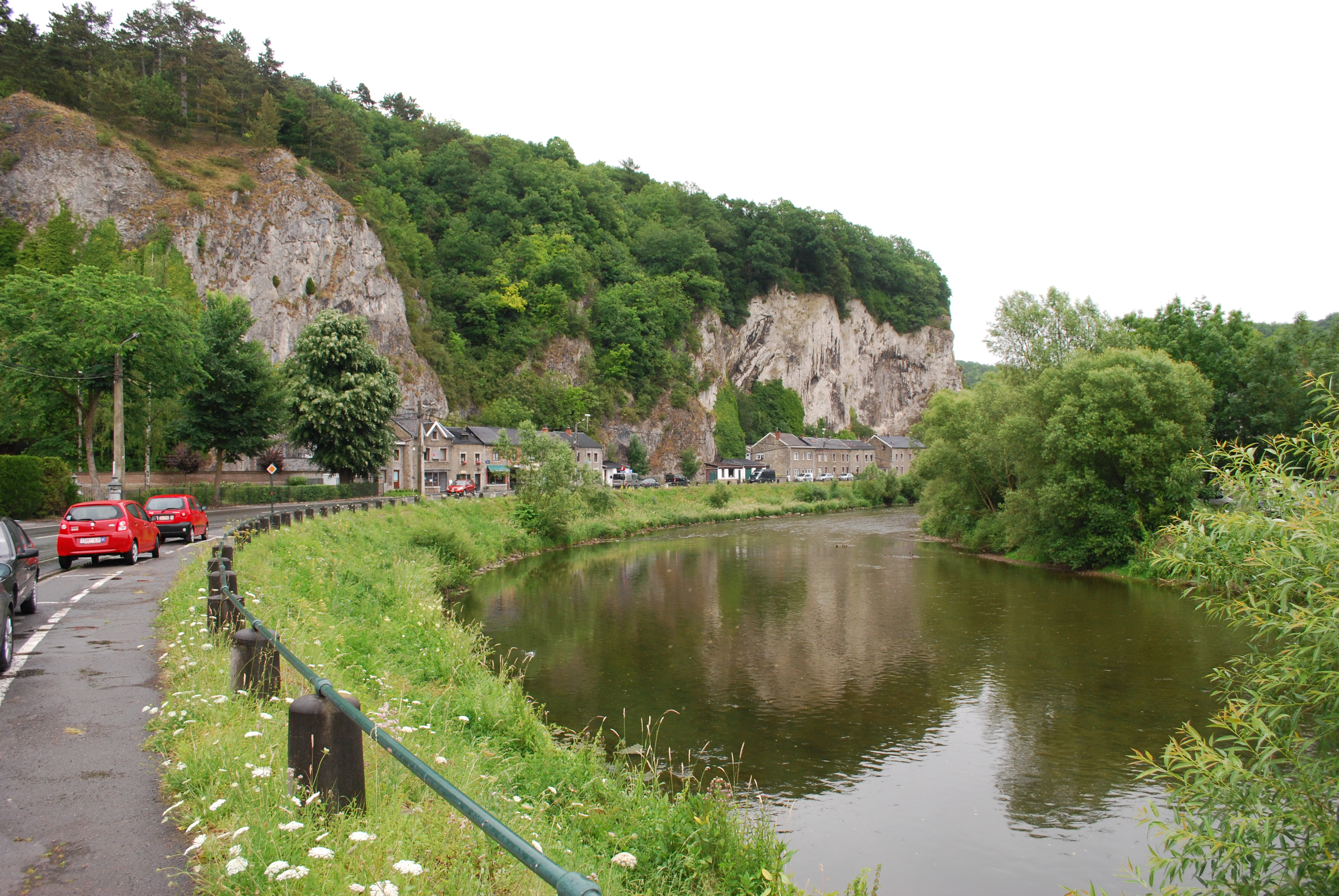 Comblain-au-Pont : quai de l'Ourthe, vue de l'Ourthe vers l'aval.